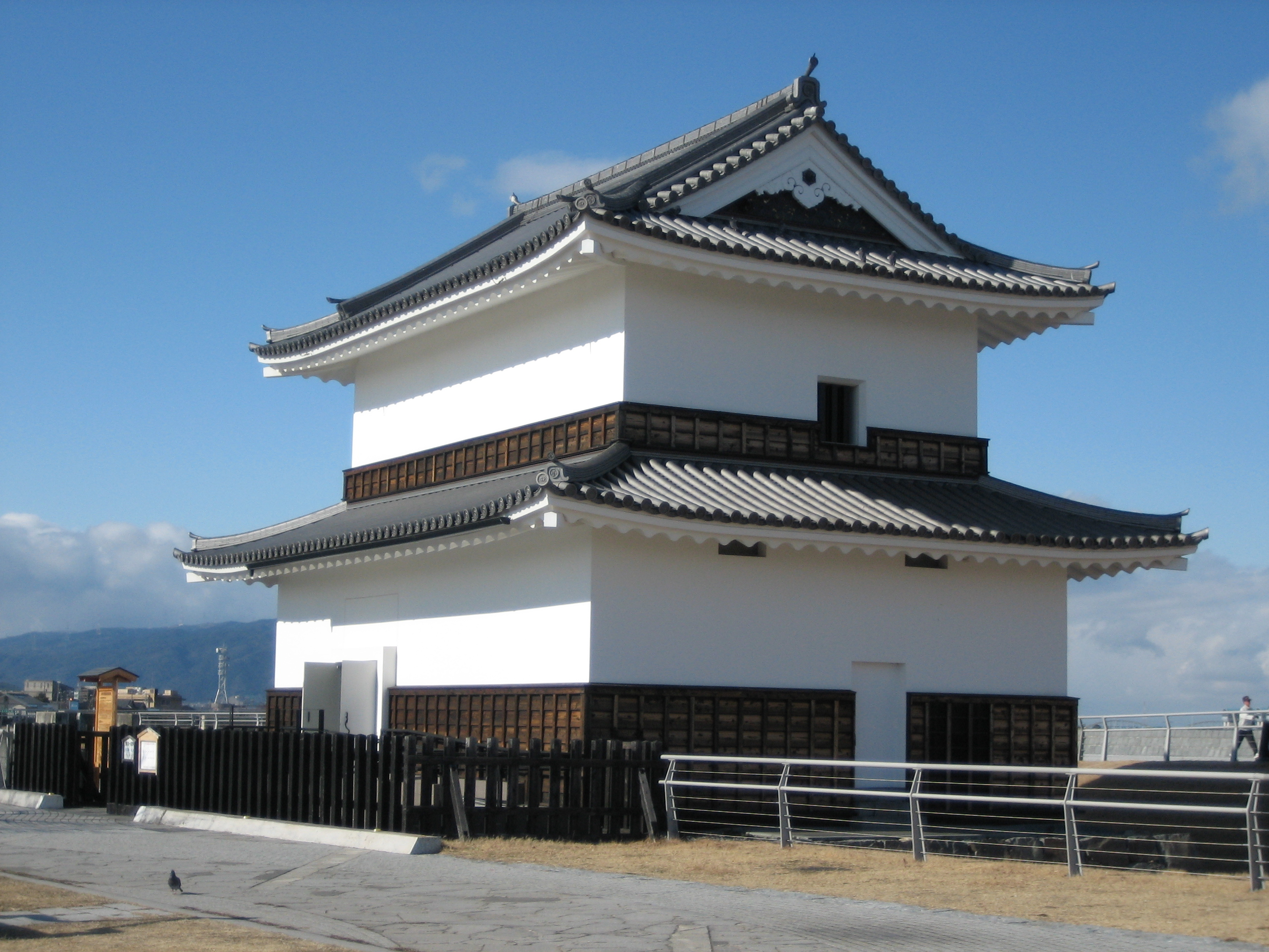 rebuilt Banryu-yagura